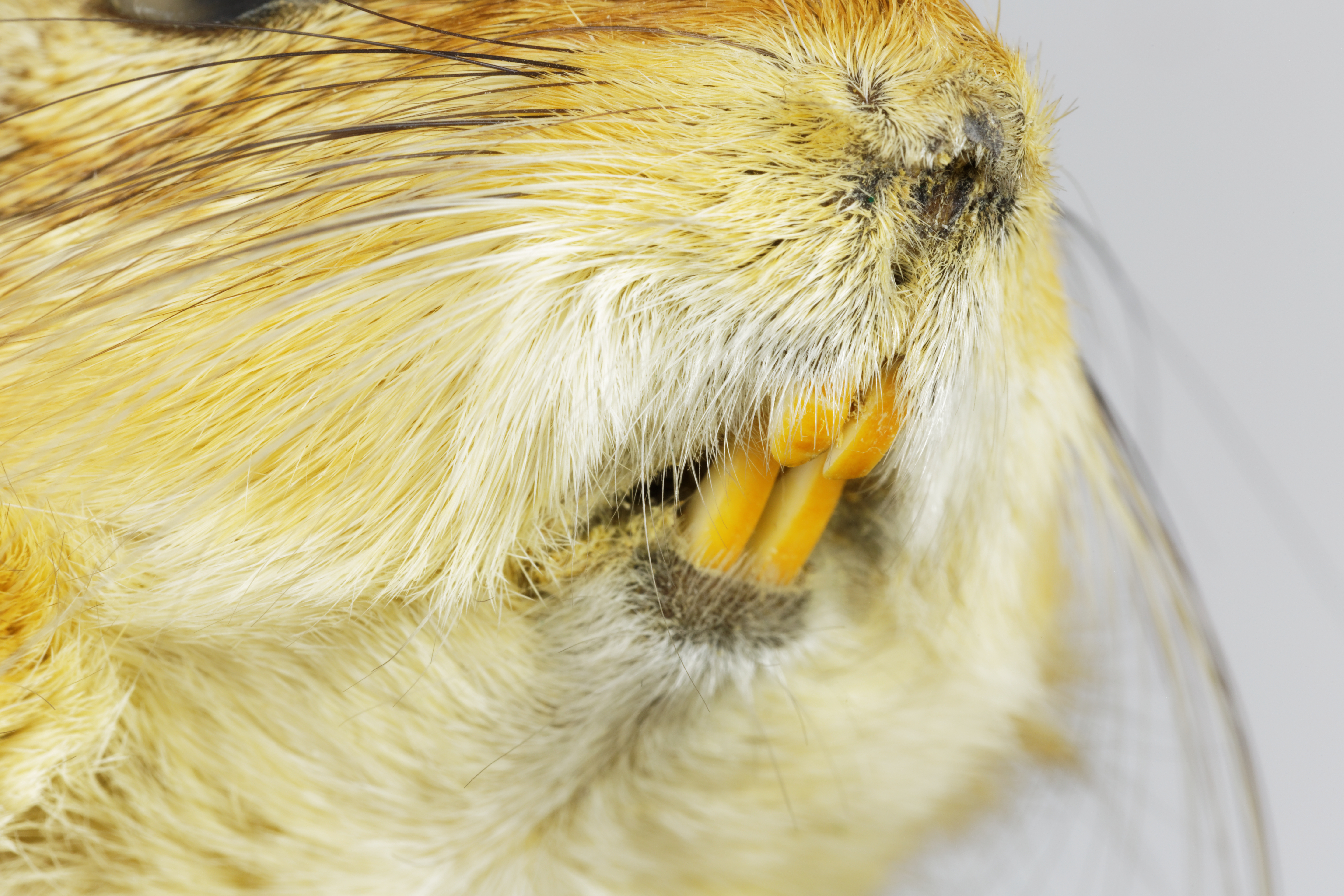 Incisives d'un Rat des sables Nom vernaculaire Rat des sables Nom latin Psammomys obesus. Nature du spécimen animal à la peau naturalisée Place dans le règne animal Chordé, Mammifère, Rongeur. Provenance Collection de Zoologie de l'Université Pierre et Marie Curie (UPMC) à Paris Dimensions du socle (cm) 24,7 (L) x 11,3 (l) x 1,6 (h) (bois) Longueur approximative du spécimen (cm) 11,5* (sans la queue). Hauteur total du spécimen (cm) 7,4 (donnée non biométrique)